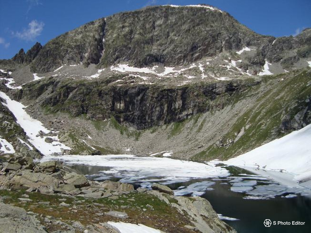 Versante Valsesiano della Punta di Ciampono